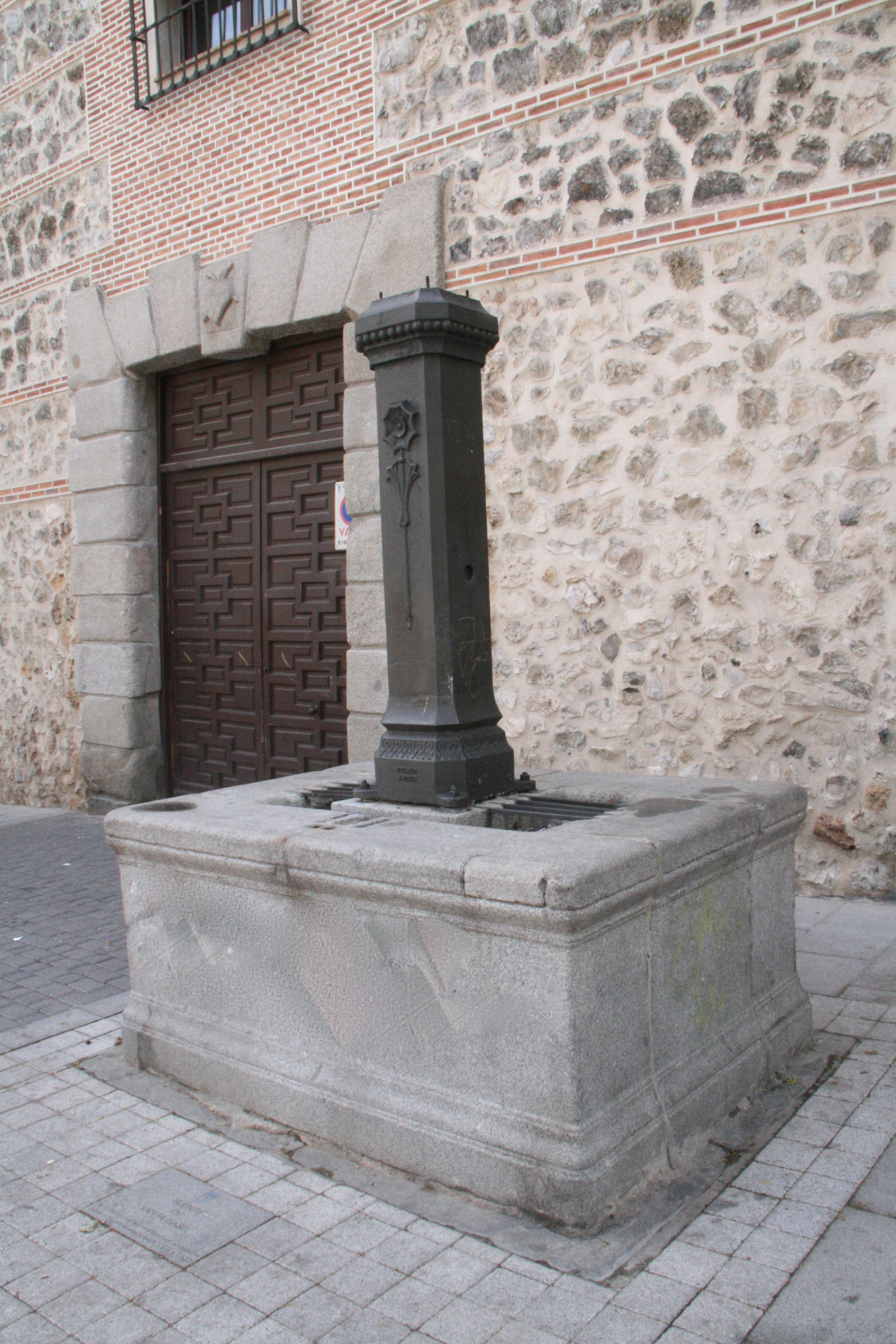 Fuente de Santa Isabel - realizada por el maestro cantero Martín de Gortairy (1621-1622)